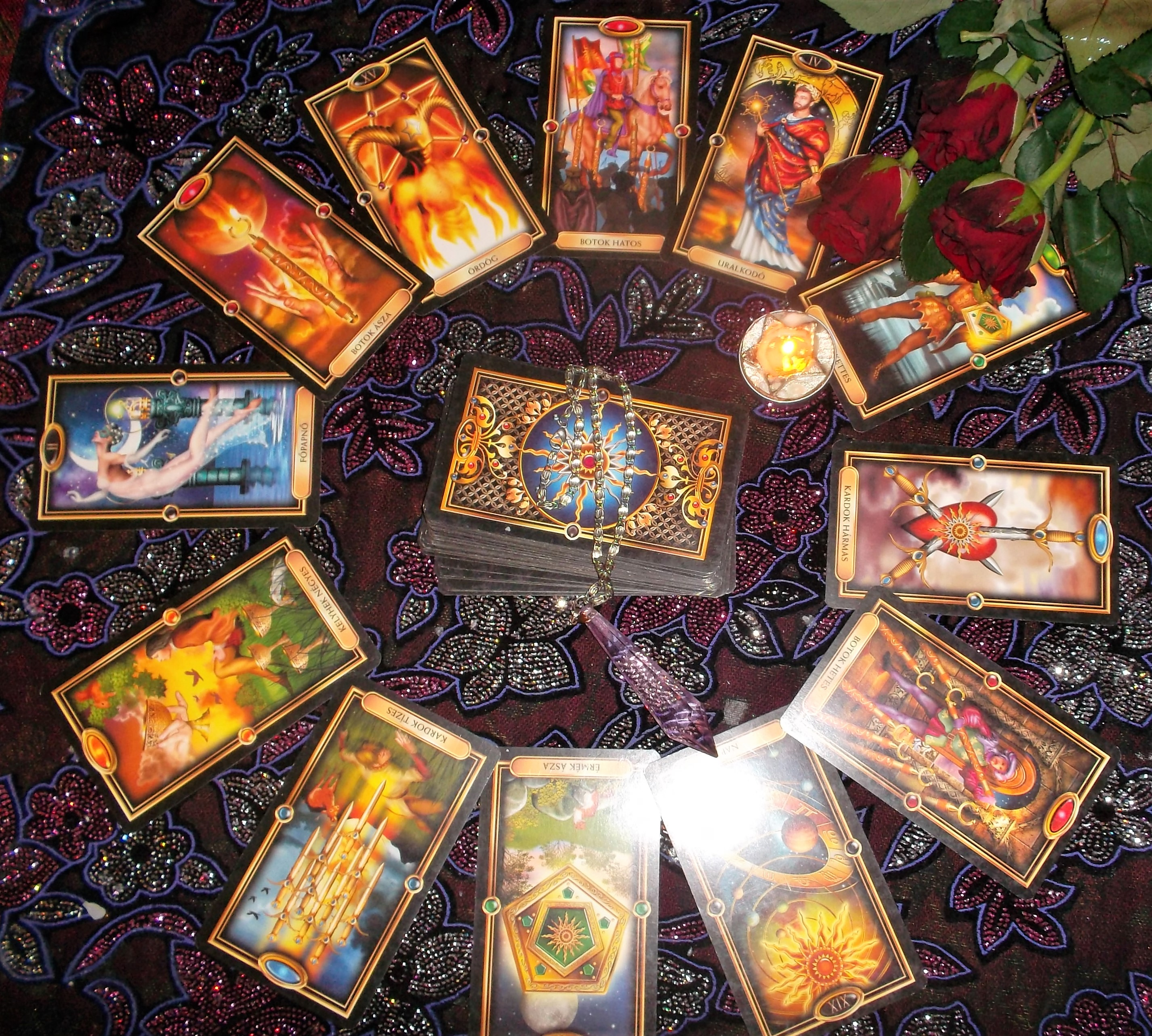 Tarot kártyavetés: A 12 életterület, asztrológiai megközelítés